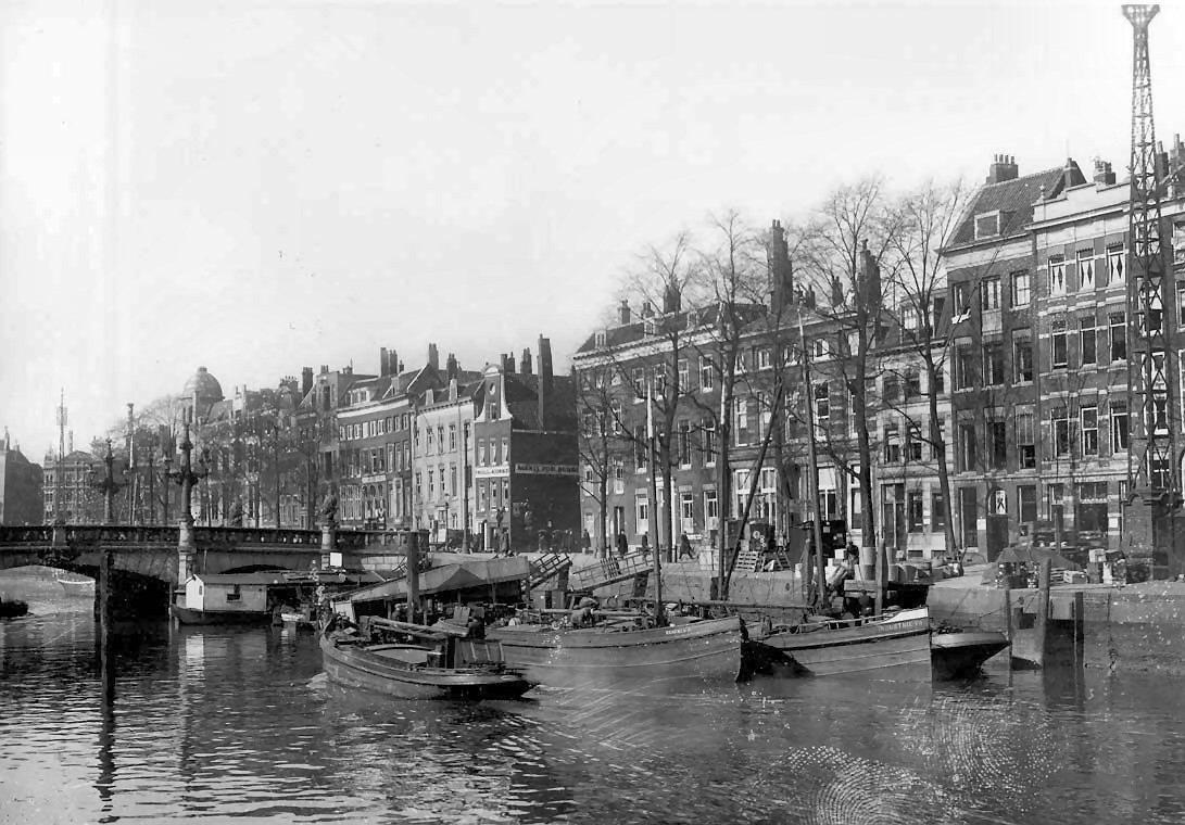 Wijnhaven en Regentessebrug